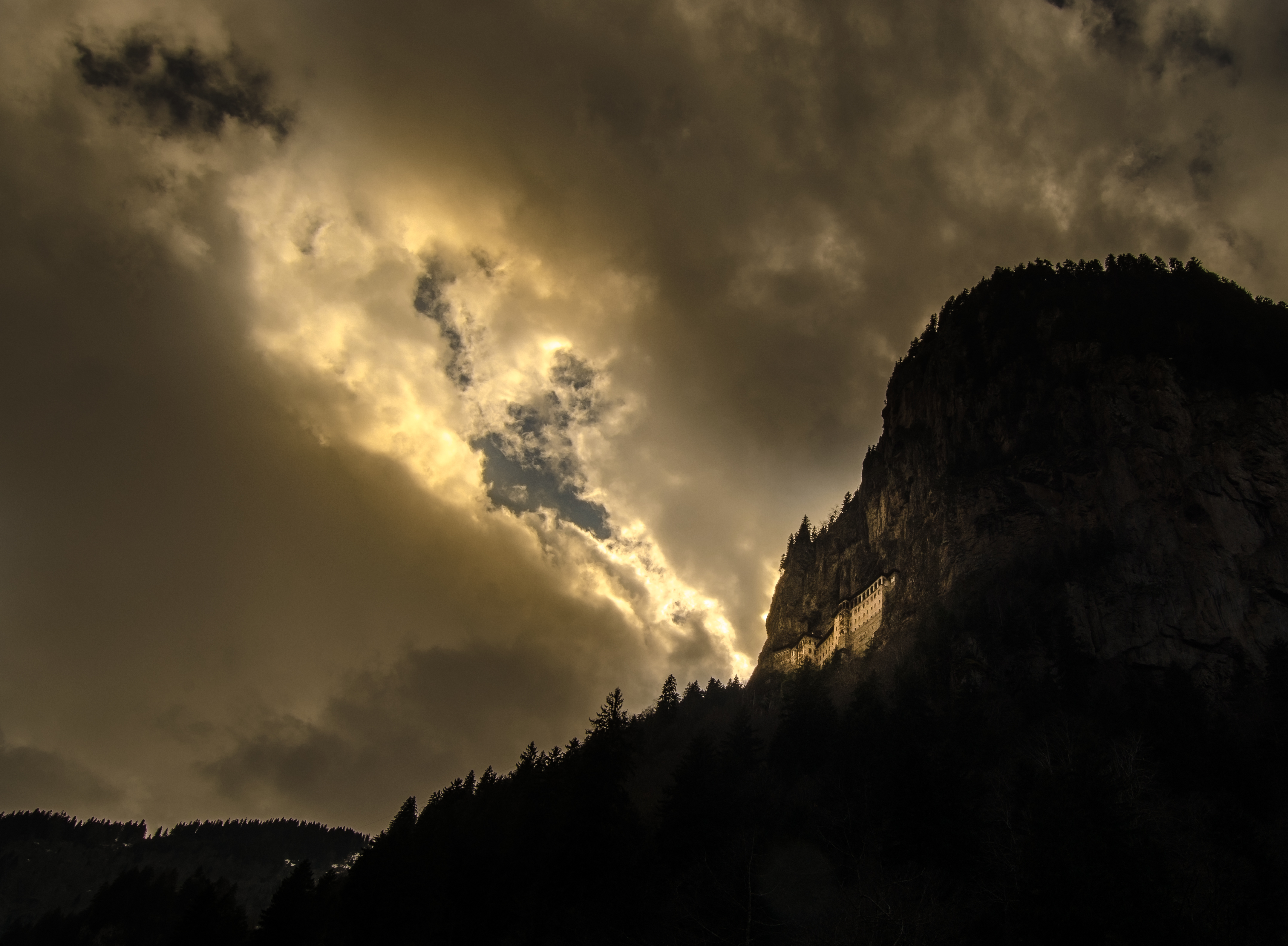 Trabzon'da bulunan Sümela Manastırı